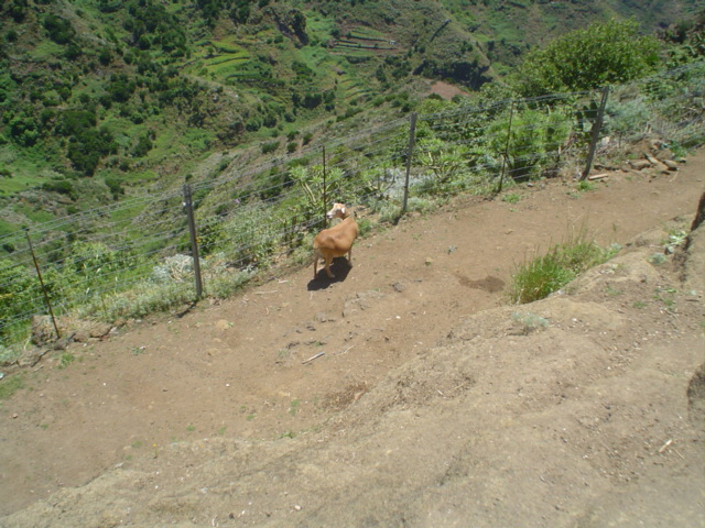 Rebaño en lo alto de Chamorga